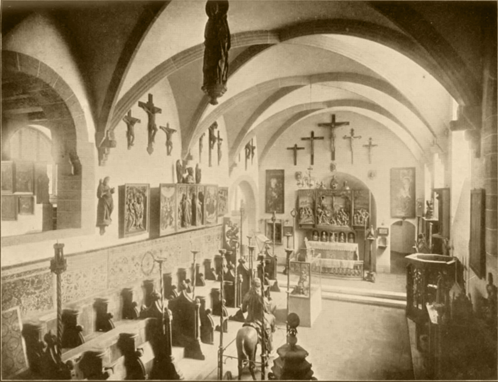 Template:Innenaufnahme der Sammlung Schnütgen, „Blick in die Kapelle vom romanischen Saal aus“